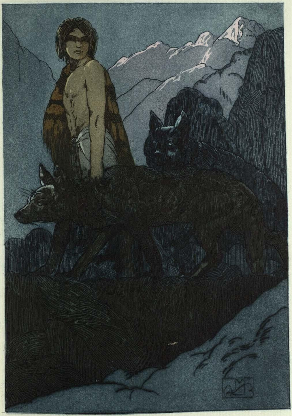 Illustration du Livre de la jungle de Kipling.